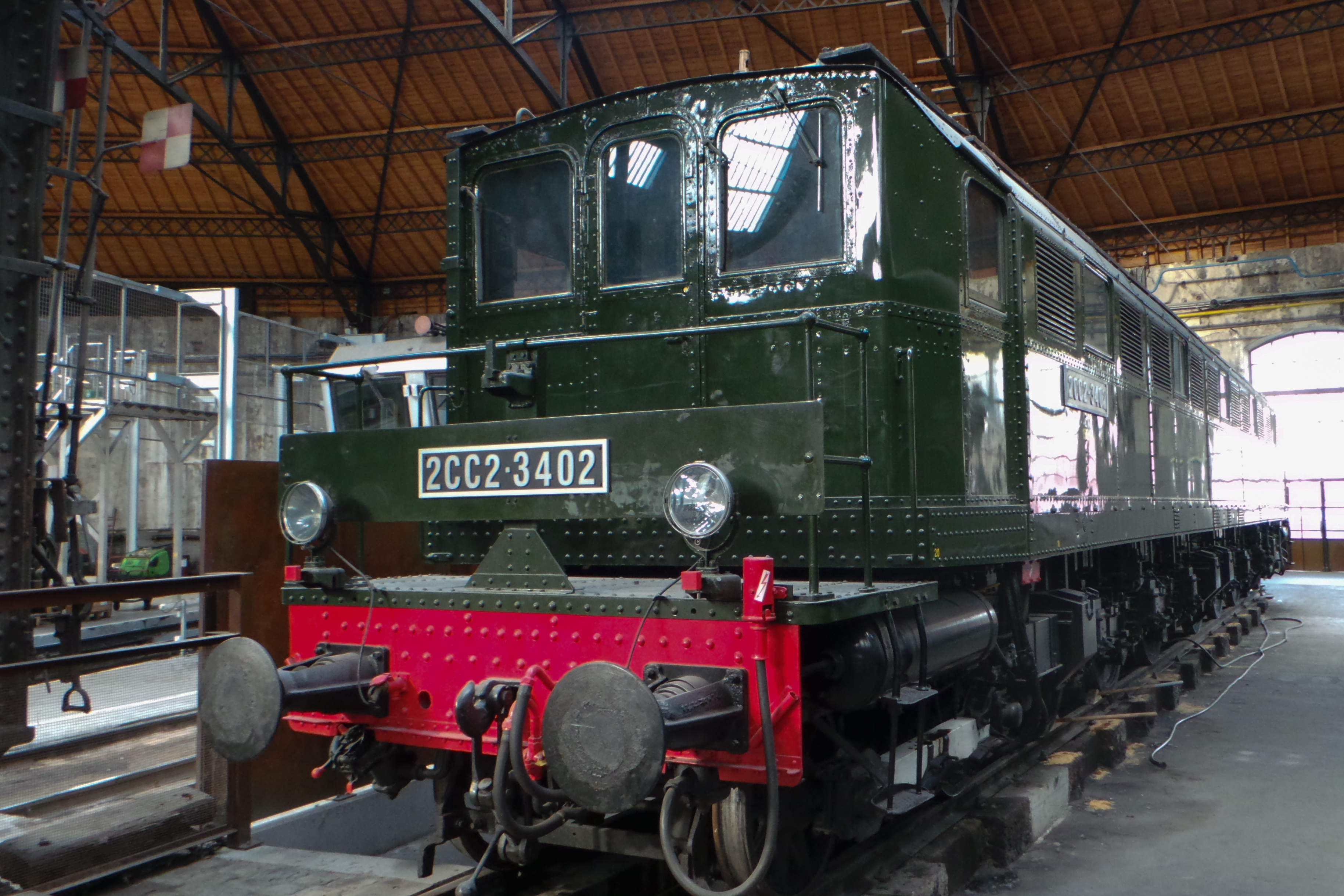 Locomotive 2CC2-3403 dans la rotonde du dépot SNCF de Chambéry / Chambéry, Savoie, France